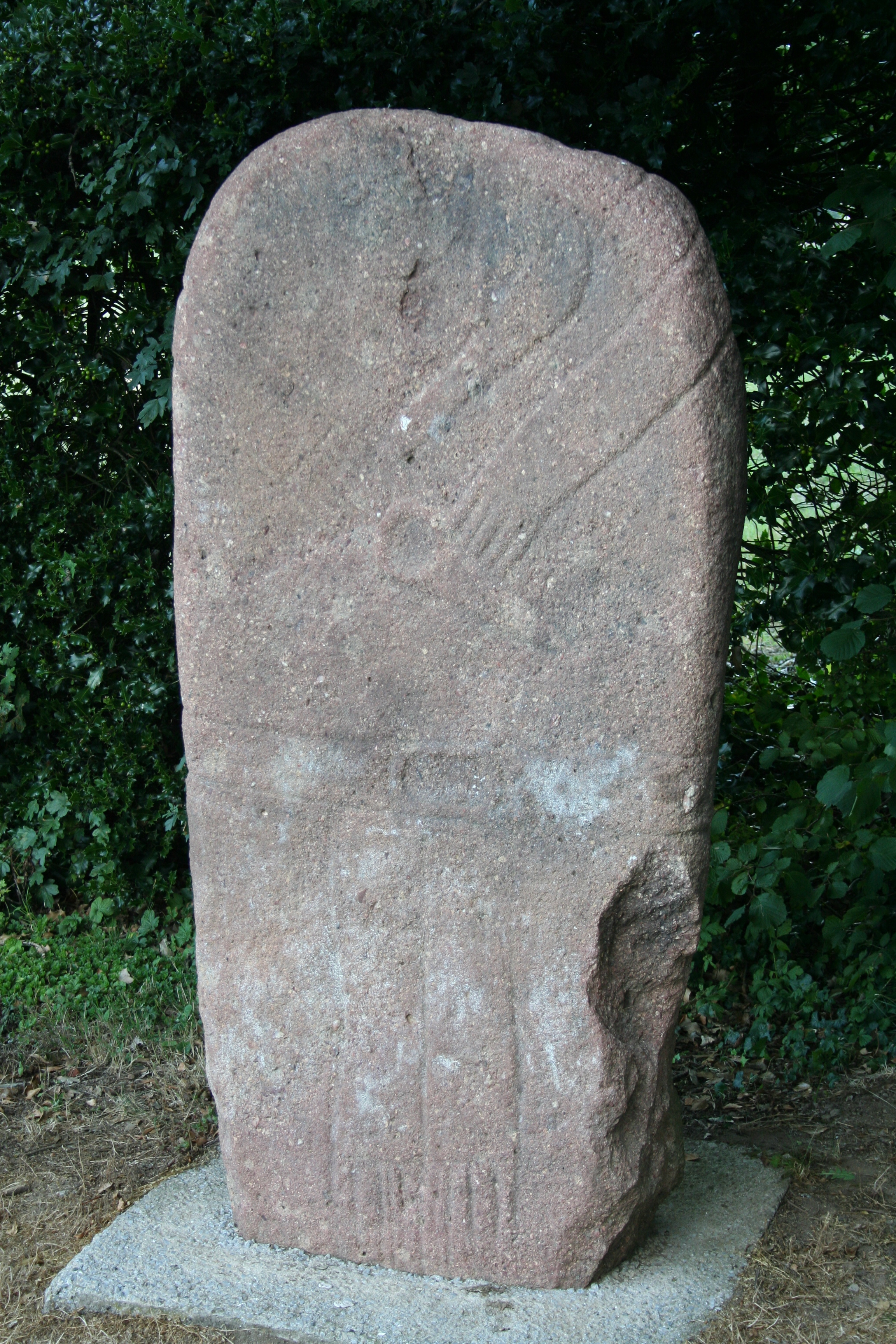 Statue-menhir de Paillemalbiau (H = 2,10 m; L = 0,84 m) (Murat-sur-Vèbre - Tarn) Auteur : Fagairolles 34